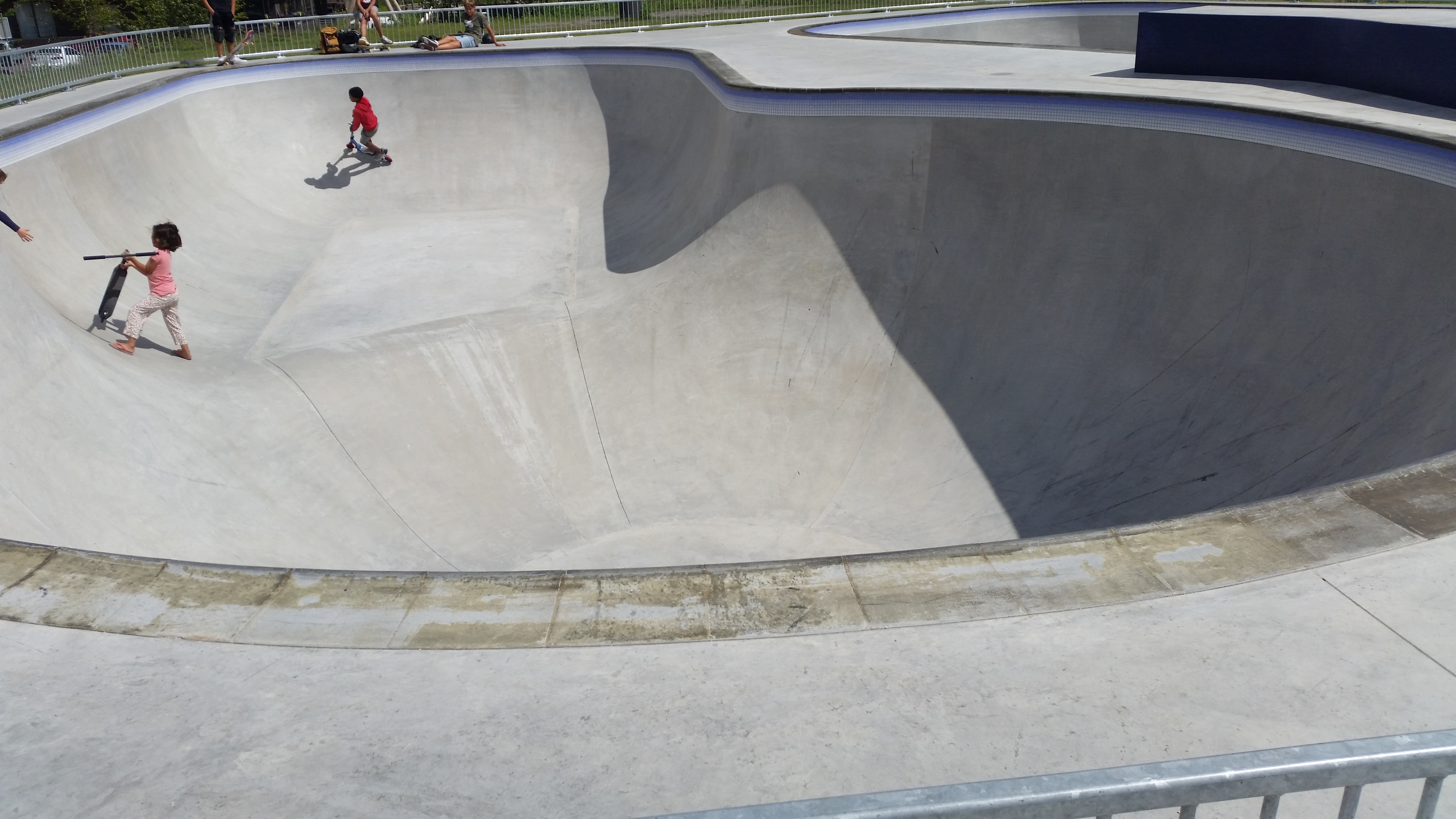 An outcast sanctuary op het skatepark Zeeburgereiland